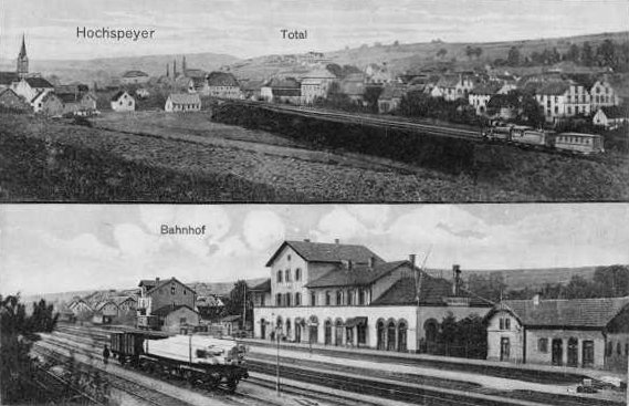 Postkarte von Hochspeyer mit Bahnhof, gelaufen 1921